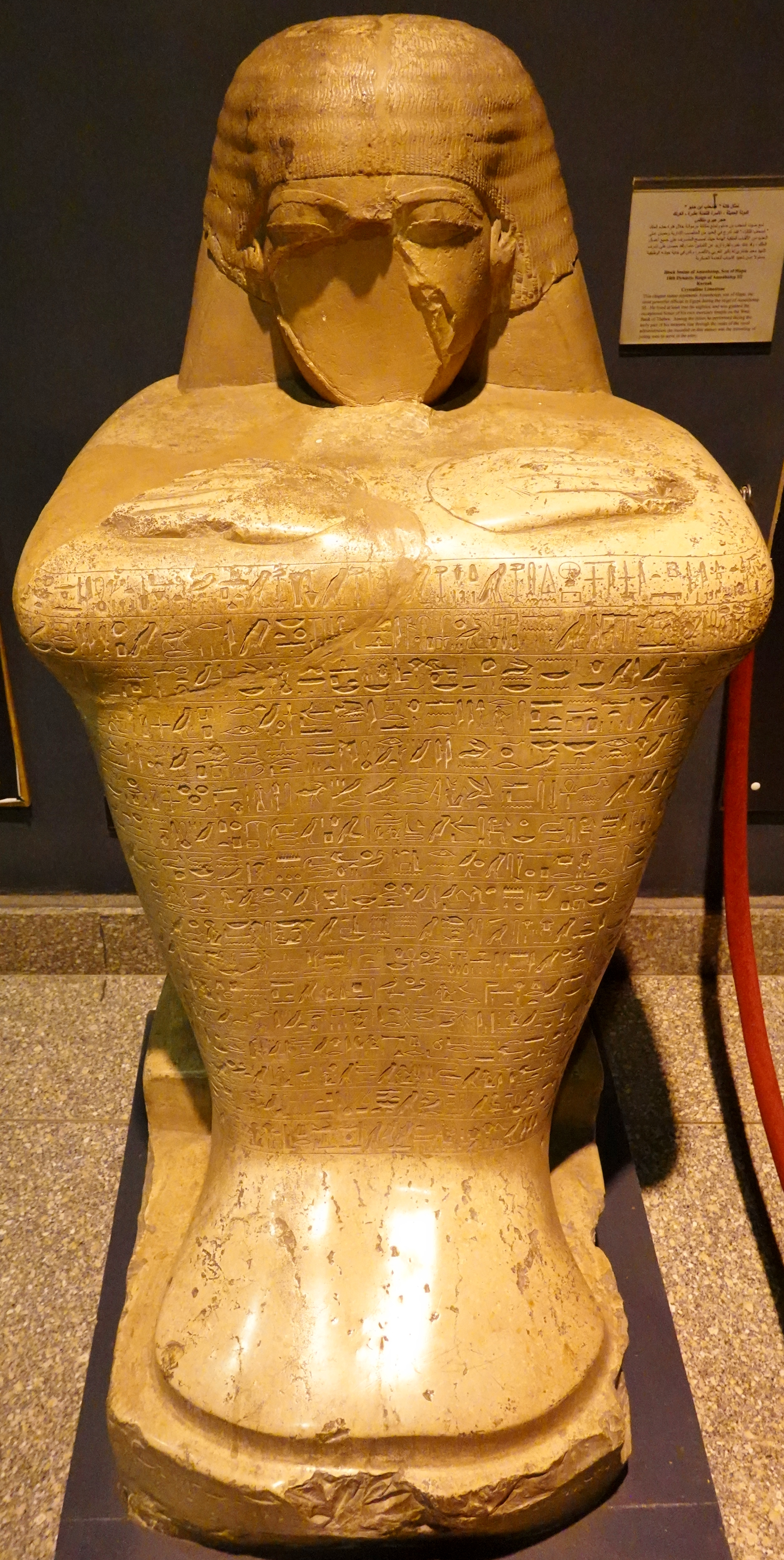 Würfelhocker des Amenophis, Sohn des Hapu, aus der Regierungszeit des Königs Amenophis III. (Kalkstein, 18. Dynastie), gefunden in Karnak, ausgestellt im Luxor-Museum, Luxor, Ägypten